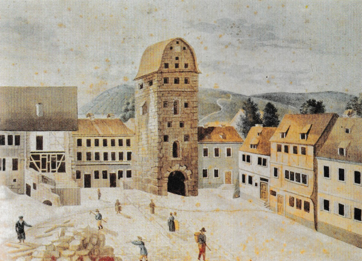 Unterer Torturm der Stadtbefestigung Meiningen, 1817 abgebrochen.